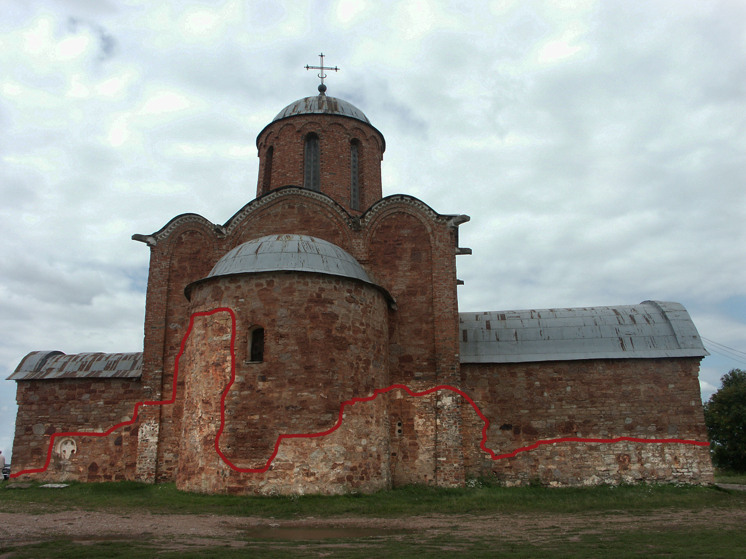 Спас на Ковалеве, восточная сторона. Линия, по которой проходит шов между изначальной постройкой и реконструкцией 1970 года